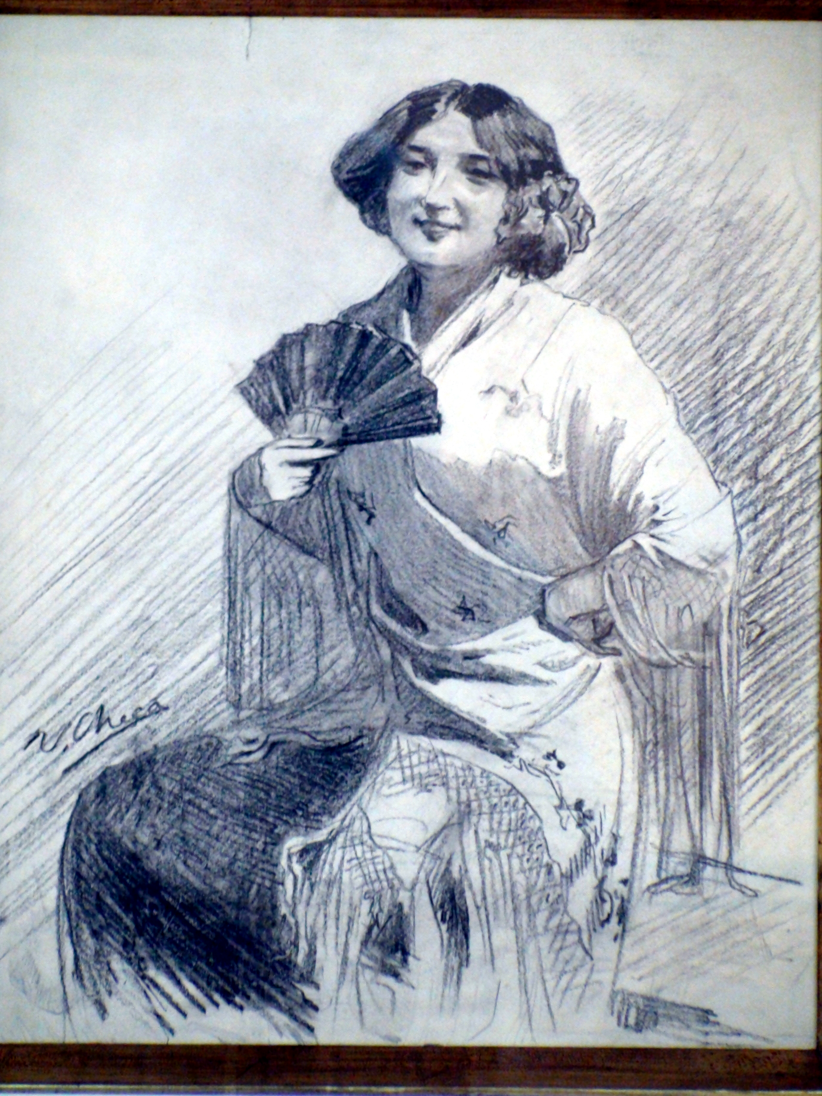 Mujer con abanico y manto. Carboncillo, tinta y lápiz sobre papel, 35 X 29 cm.